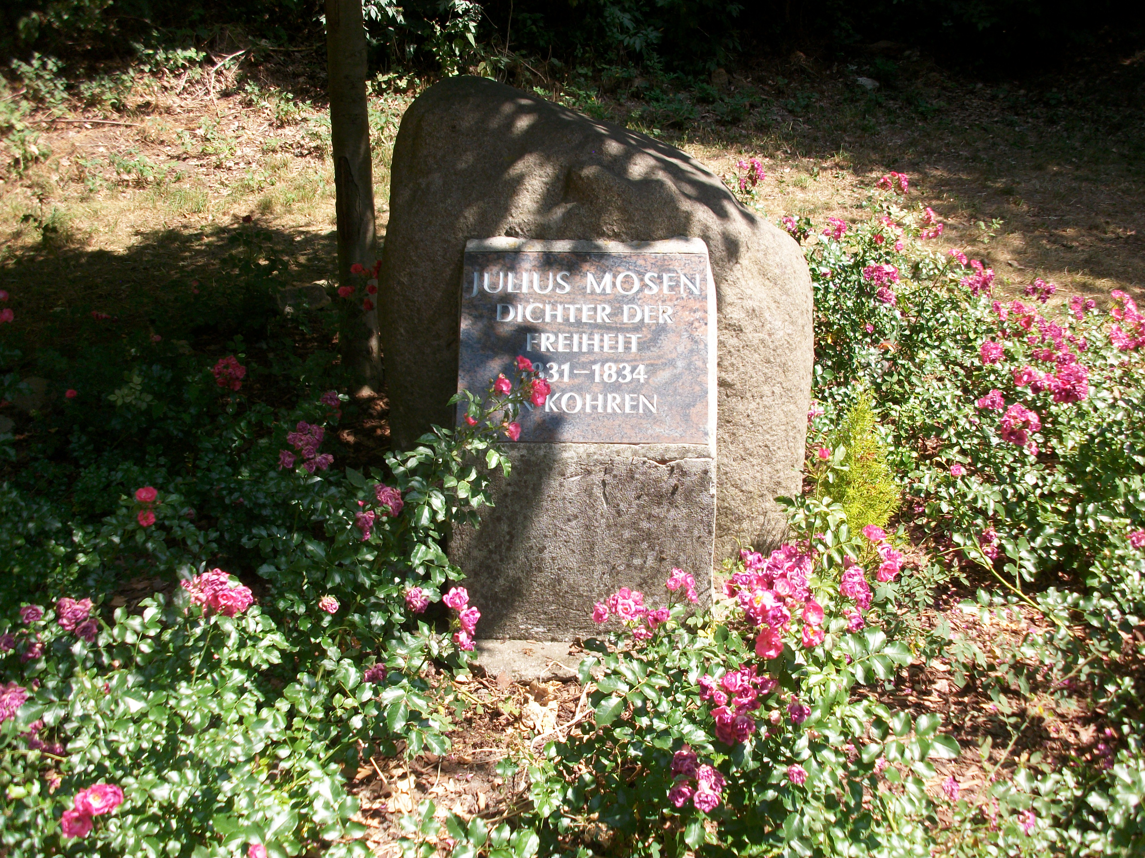 Kohren-Sahlis, Gedenkstein Julius Mosen